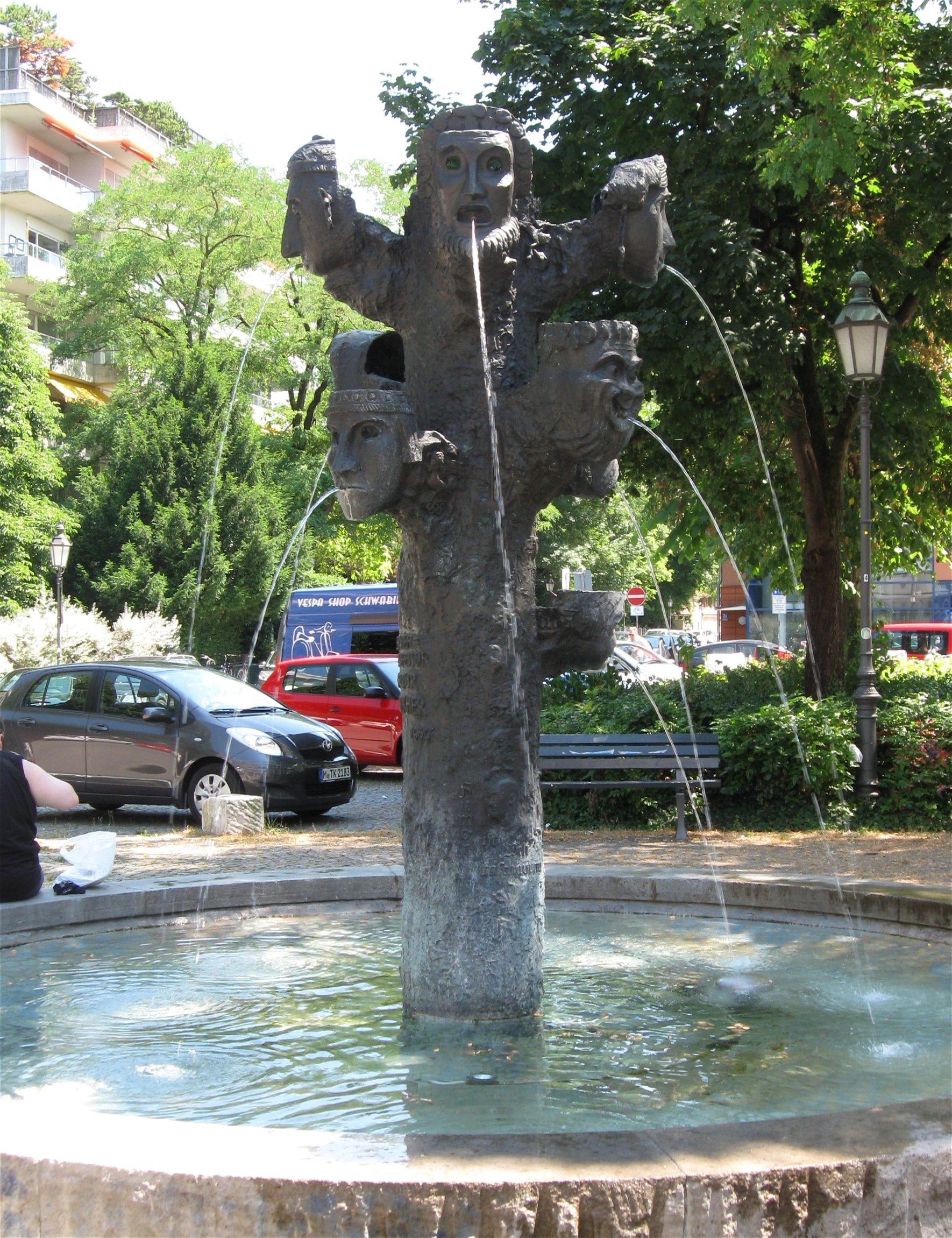 Artur-Kutscher-Brunnen, Artur-Kutscher-Platz, Schwabing, 1968 von Lothar Dietz